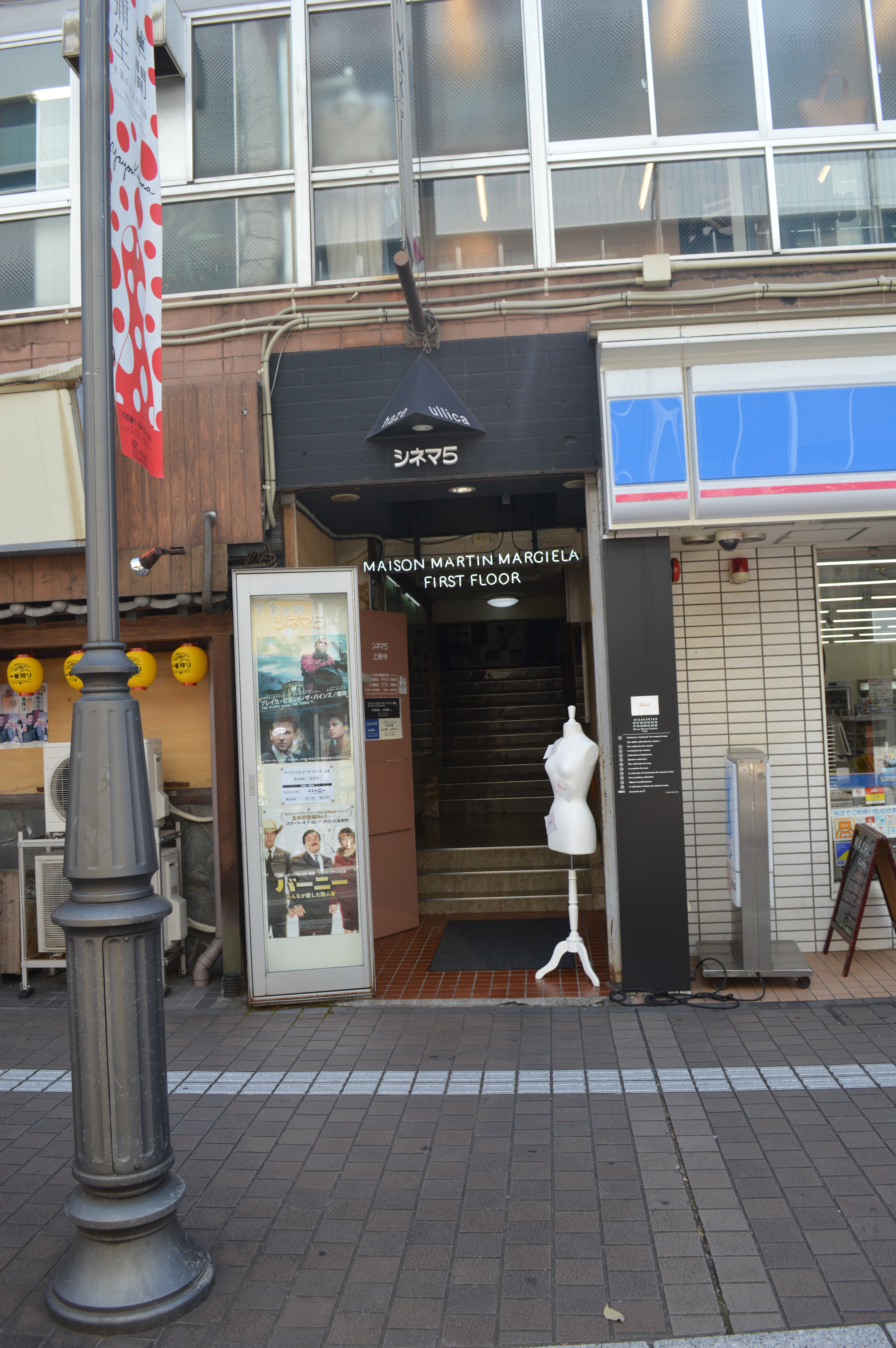 大分市の映画館「シネマ5」